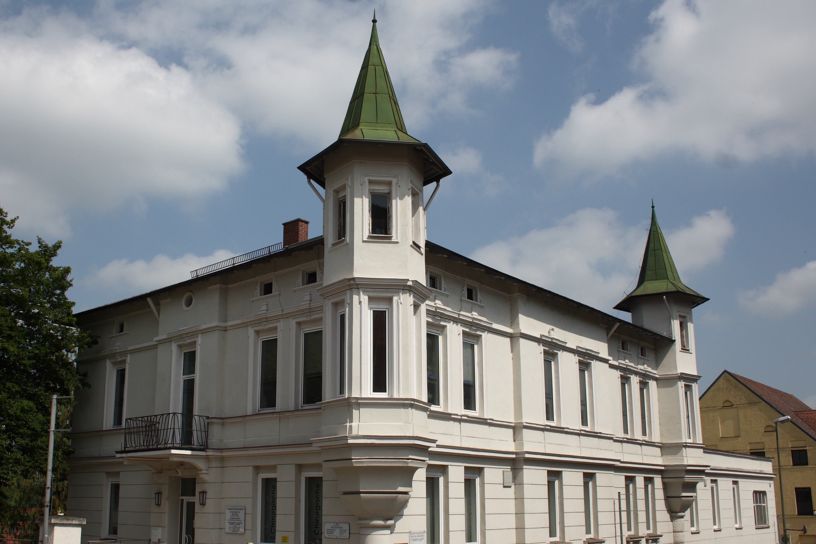 Ehem. Wohnhaus in Günzburg (Bayern), Dillinger Straße 1, errichtet 1878, mit Erkertürmchen